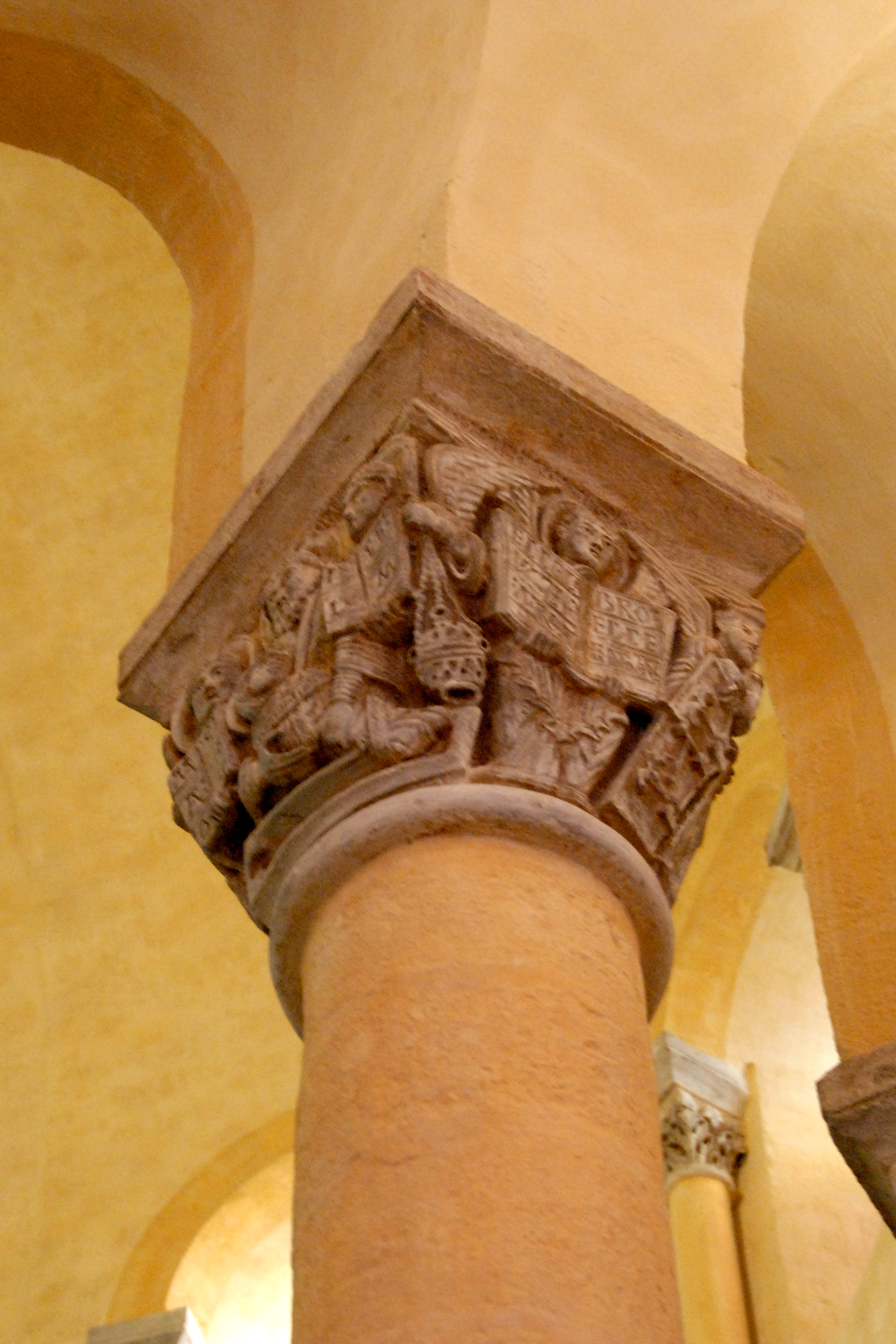 Notre-Dame du Port, Chorkapitell D, Seiten 14 + 13